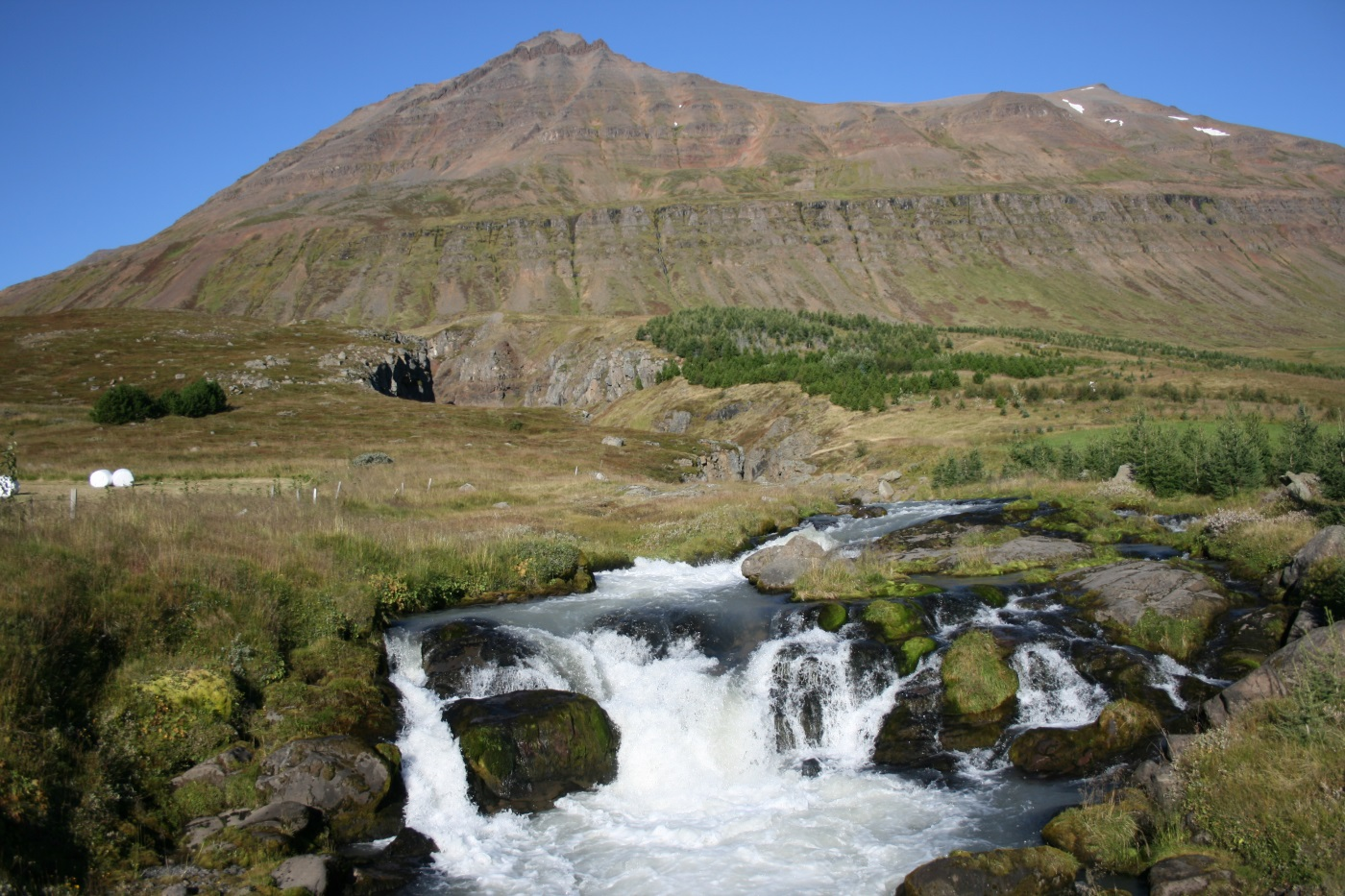 Þverá í Skíðadal, Þverárgil og Hamrahnjúkur